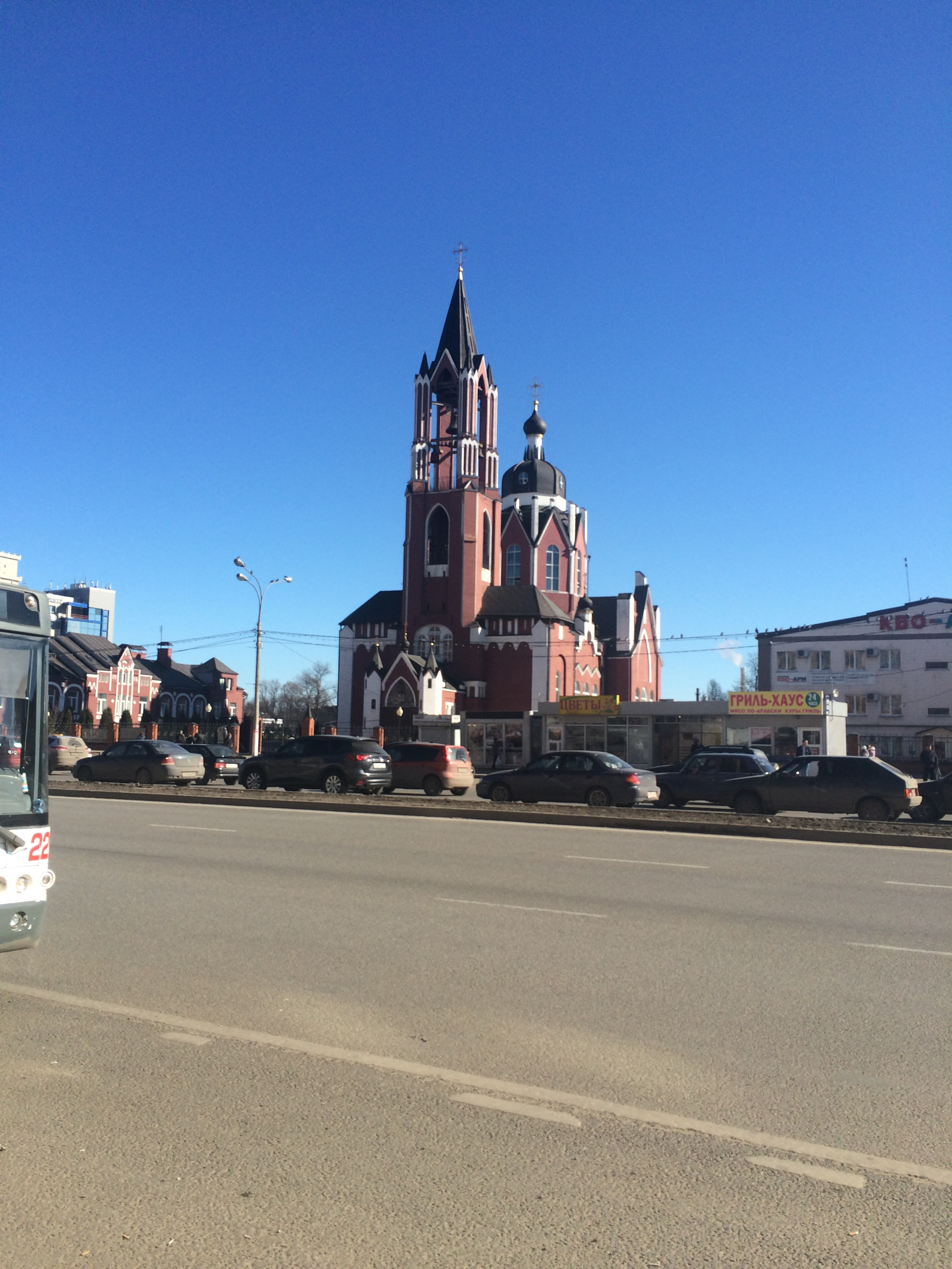 Щелково Пролетарский проспект